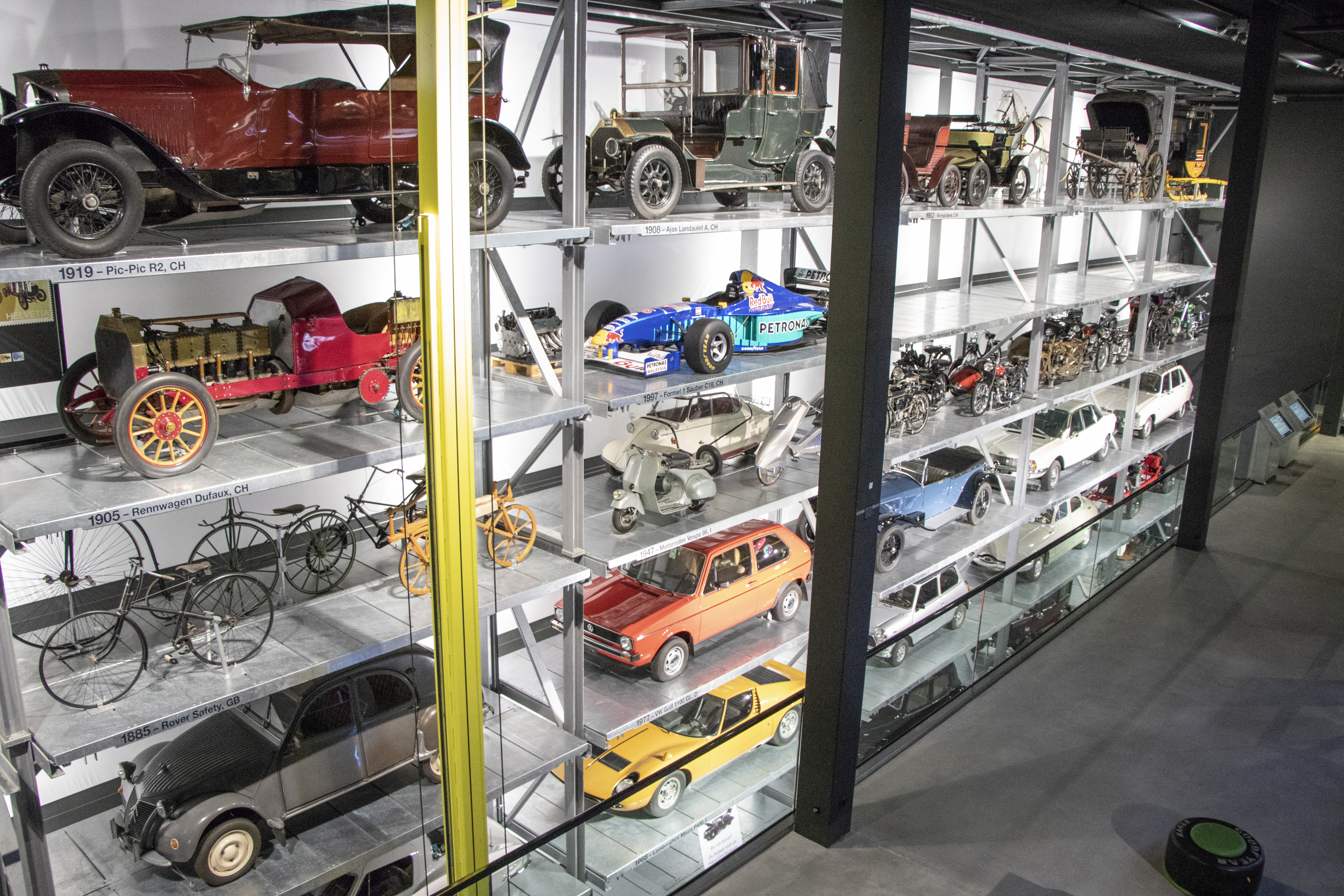 Das Schaulager in der Halle Strassenverkehr im Verkehrshaus der Schweiz.